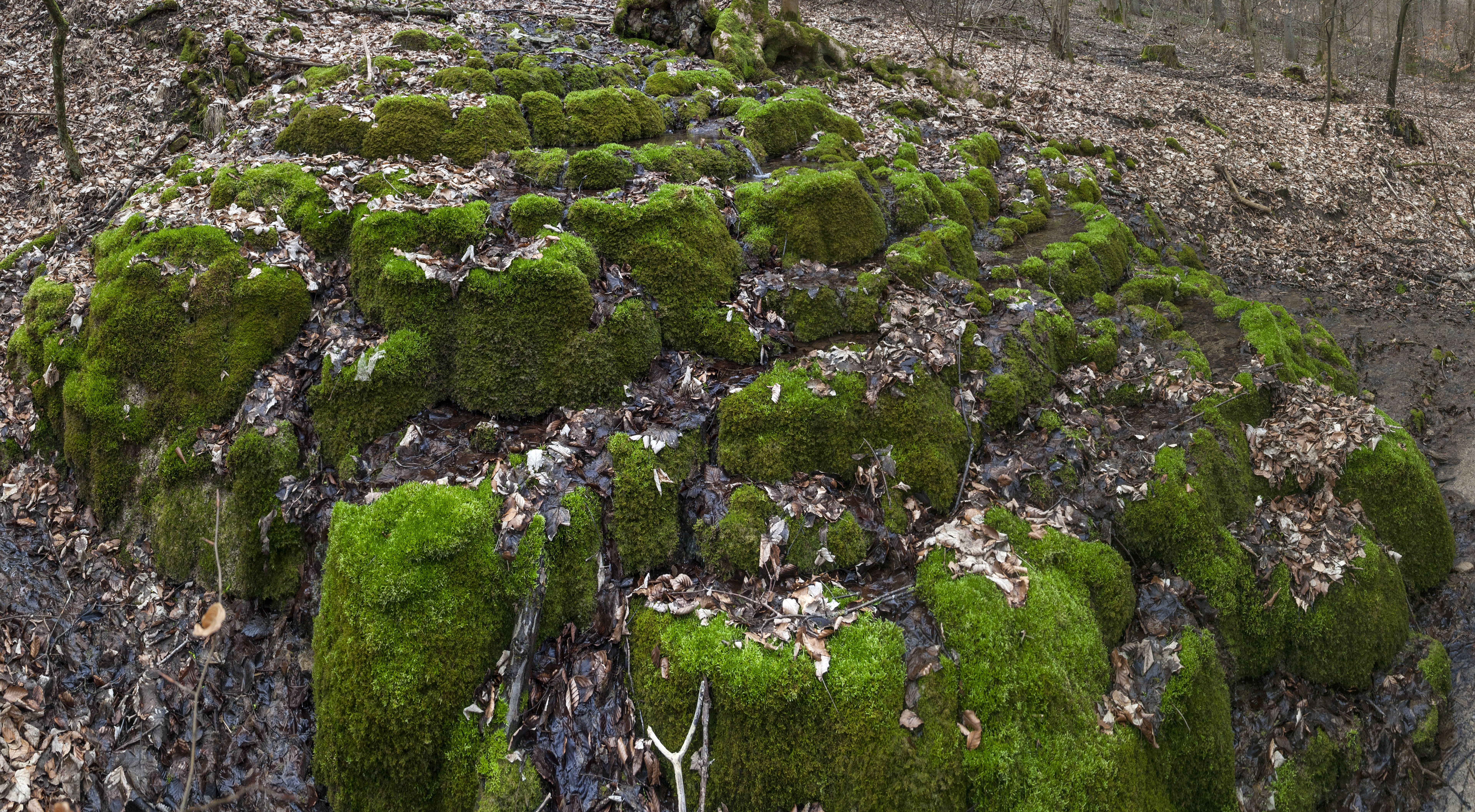 Kalktuffterasse, Kainsbach, Geotop